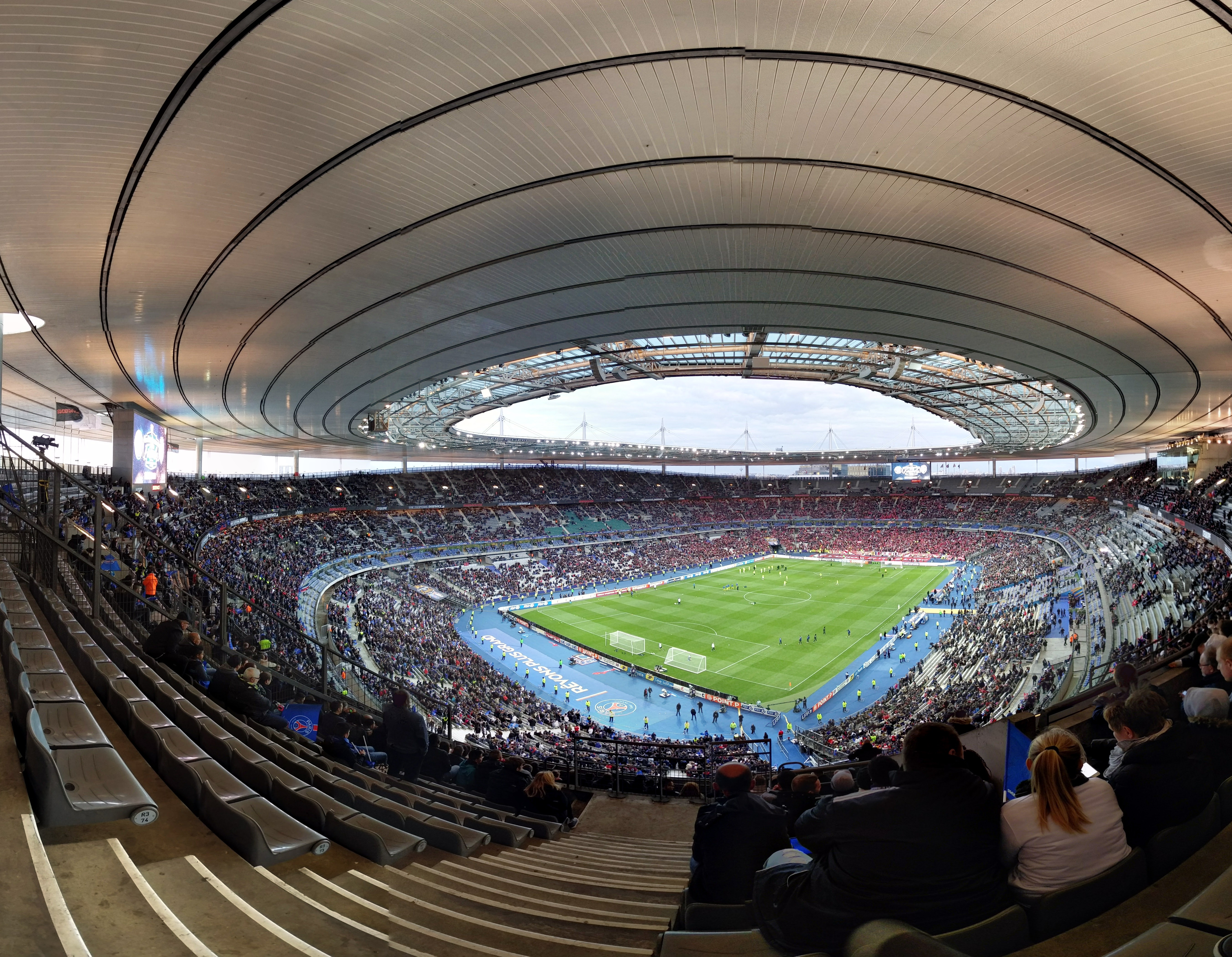 Le Stade de France lors de la finale de la Coupe de la Ligue 2015 - 2016 opposant le Paris Saint-Germain et le Lille OSC